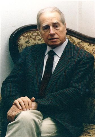 Lucjan Kydryński (1929-2006).